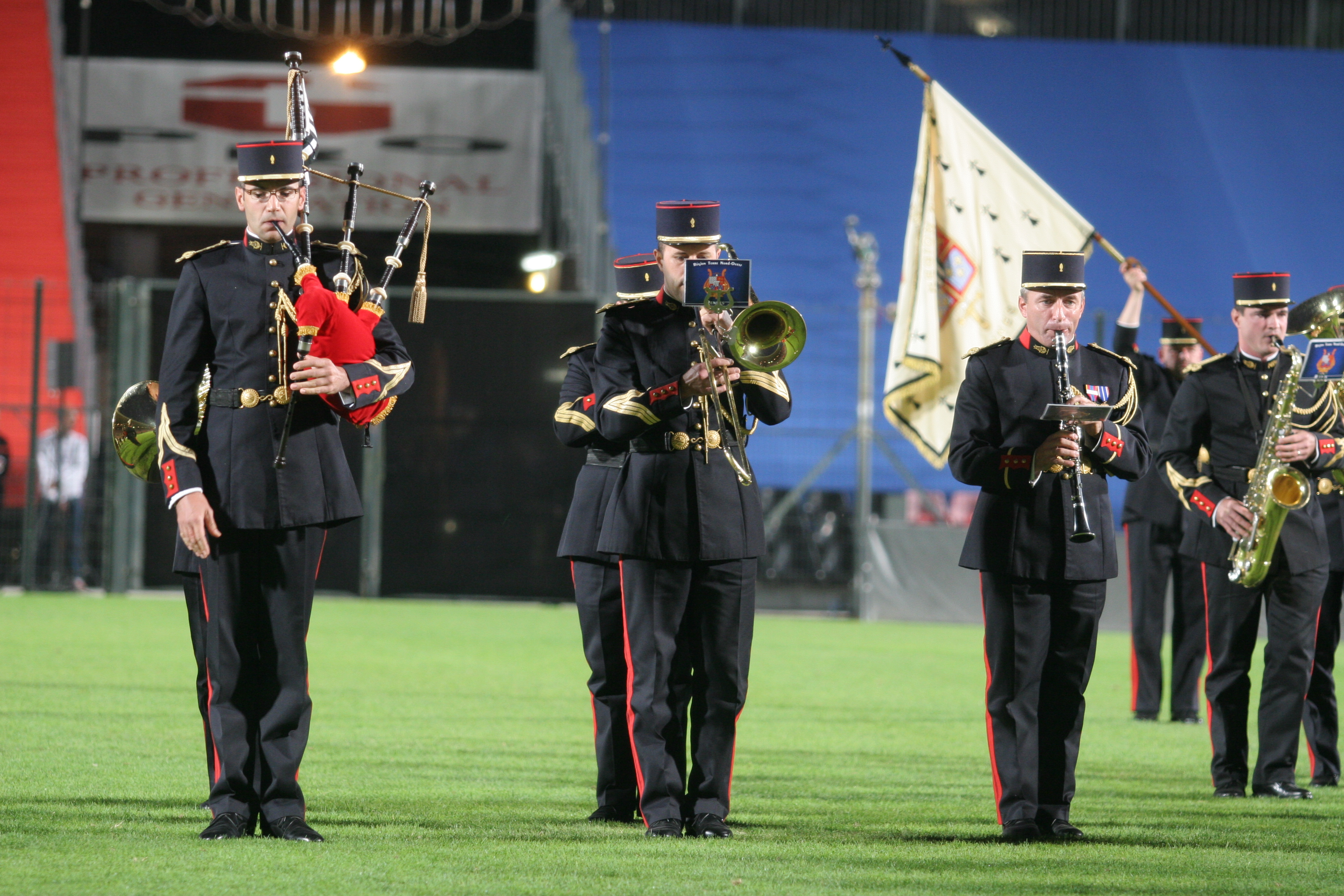 Musique de la Région terre nord-ouest de l'armée de Terre française en tenue de parade lors de festival de musiques militaires de nice le 6 octobre 2007